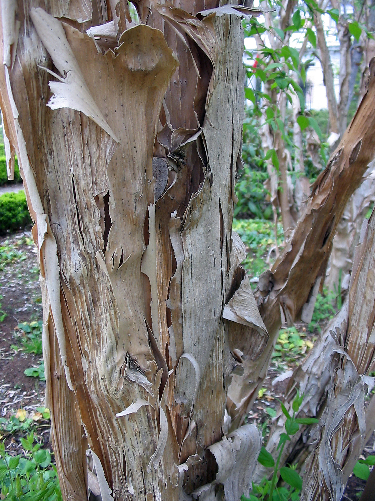 Fotografía de Pablo Alberto Salguero Quiles de la textura del tronco de Kolkwitzia amabilis de las Caprifoliaceae, se le supone nativo de China. La fotografía está realizada en el Real Jardín Botánico de Madrid. España. El 4 de Abril de 2007.